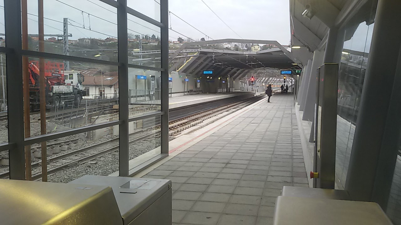 Vista de la estación de Loiola desde el acceso oeste al andén 1 (La Salle) de Metro Donostialdea operado por Euskotren. A la izquierda se ve la estación provisional, en desconstrucción durante 2017